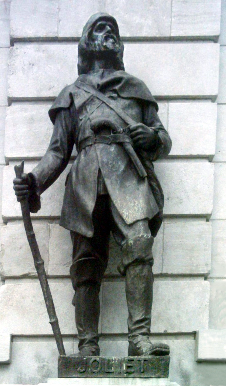 Louis Jolliet, sculpture devant l'hôtel du Parlement de Québec, aile droite, série des découvreurs